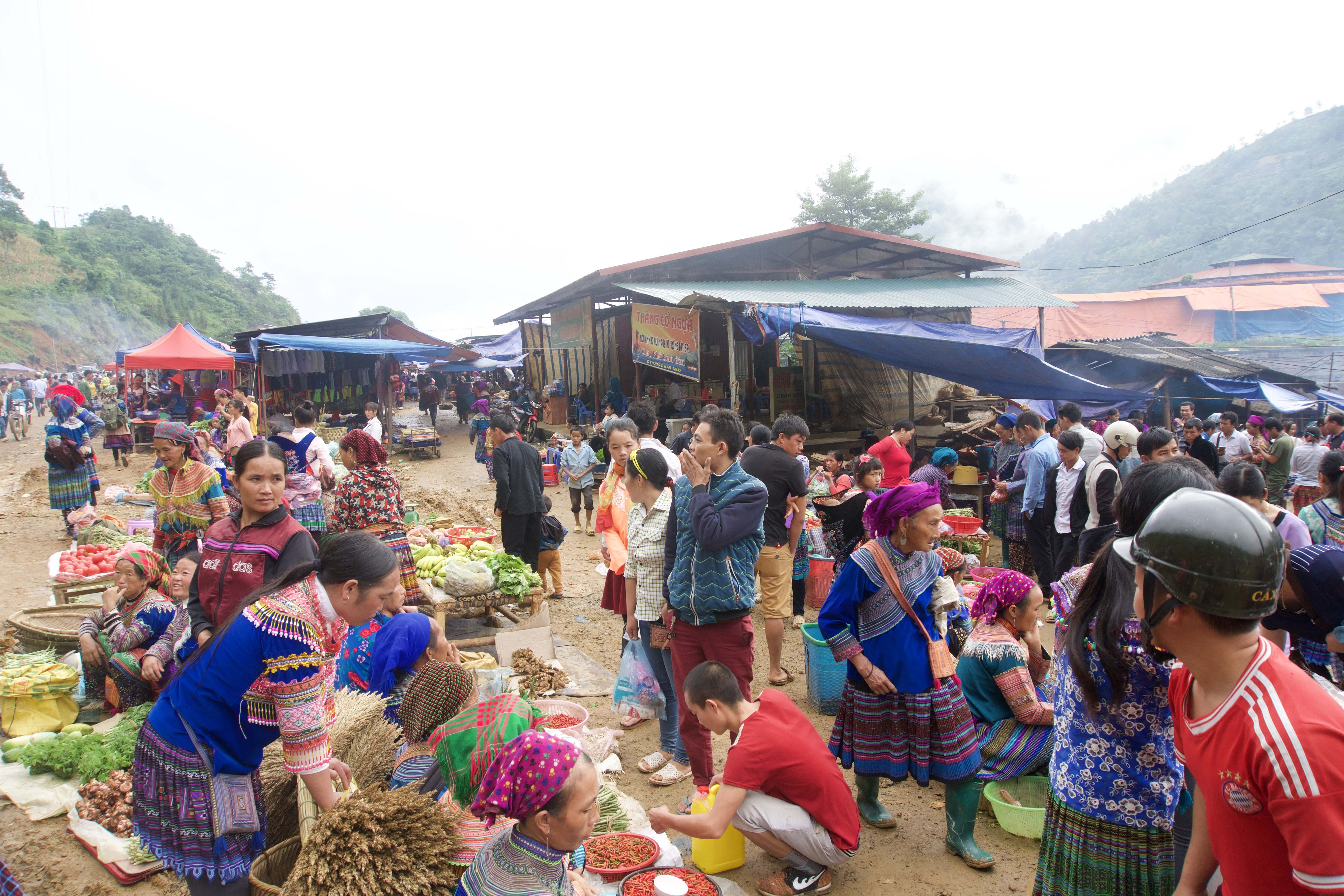 Một góc chợ Cán Cấu vào tháng 10 năm 2017